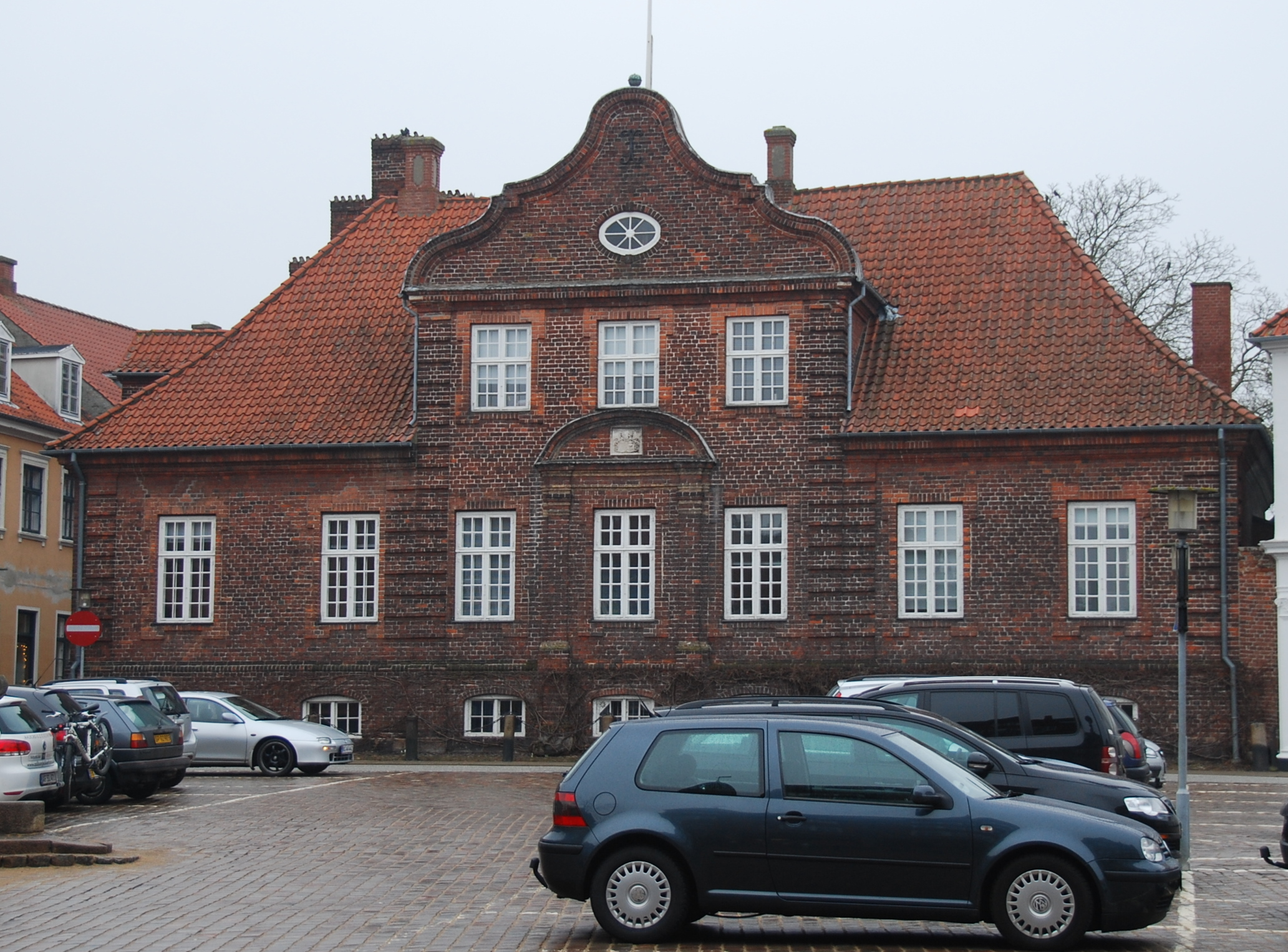 Den fredede bygning "Amtmandsgården" i Viborg.